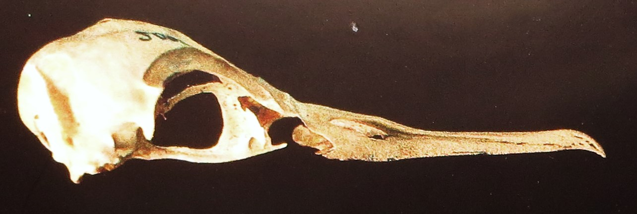 Fossil of Puffinus, an extinct bird- Took the picture at Museo de la Naturaleza y el Hombre - Tenerife